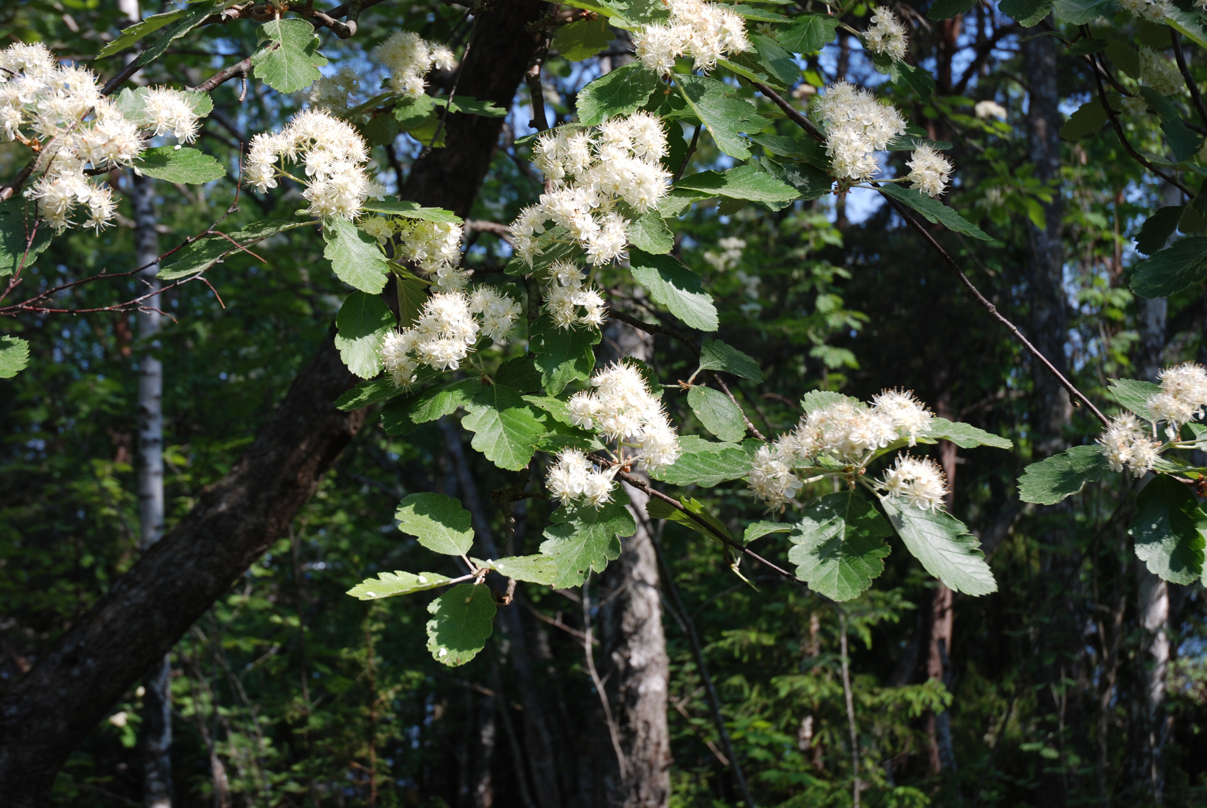 Blommande oxel. Sorbus intermedia blossoming